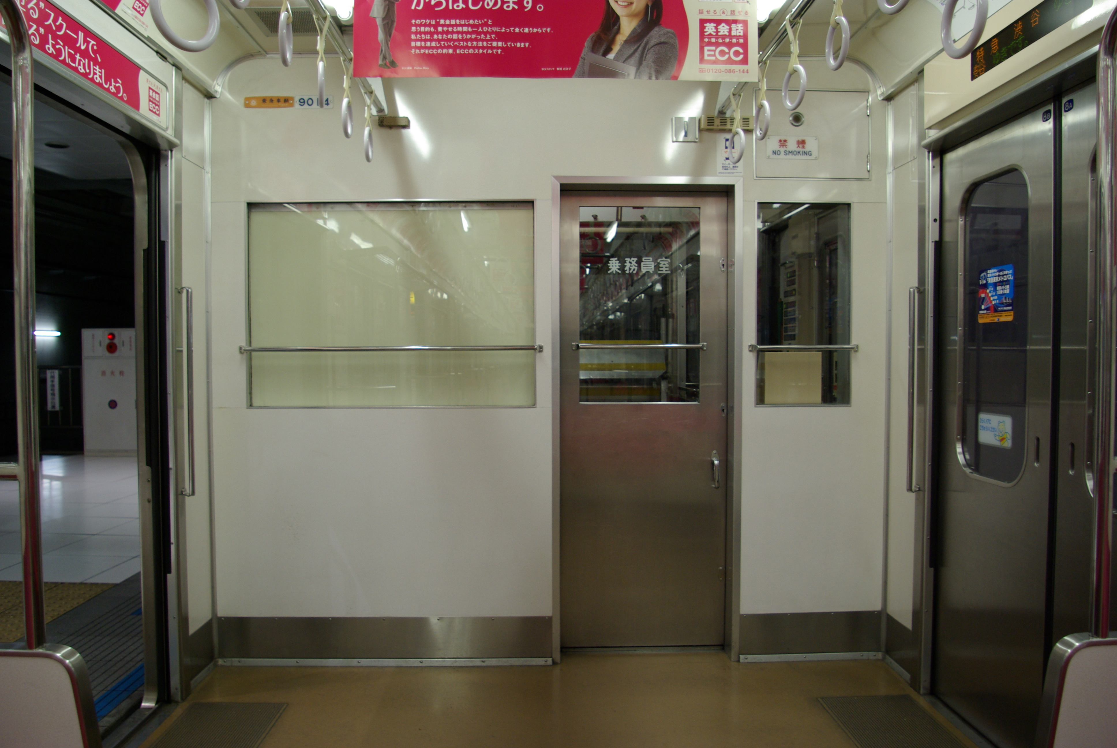 東急9000系9014号